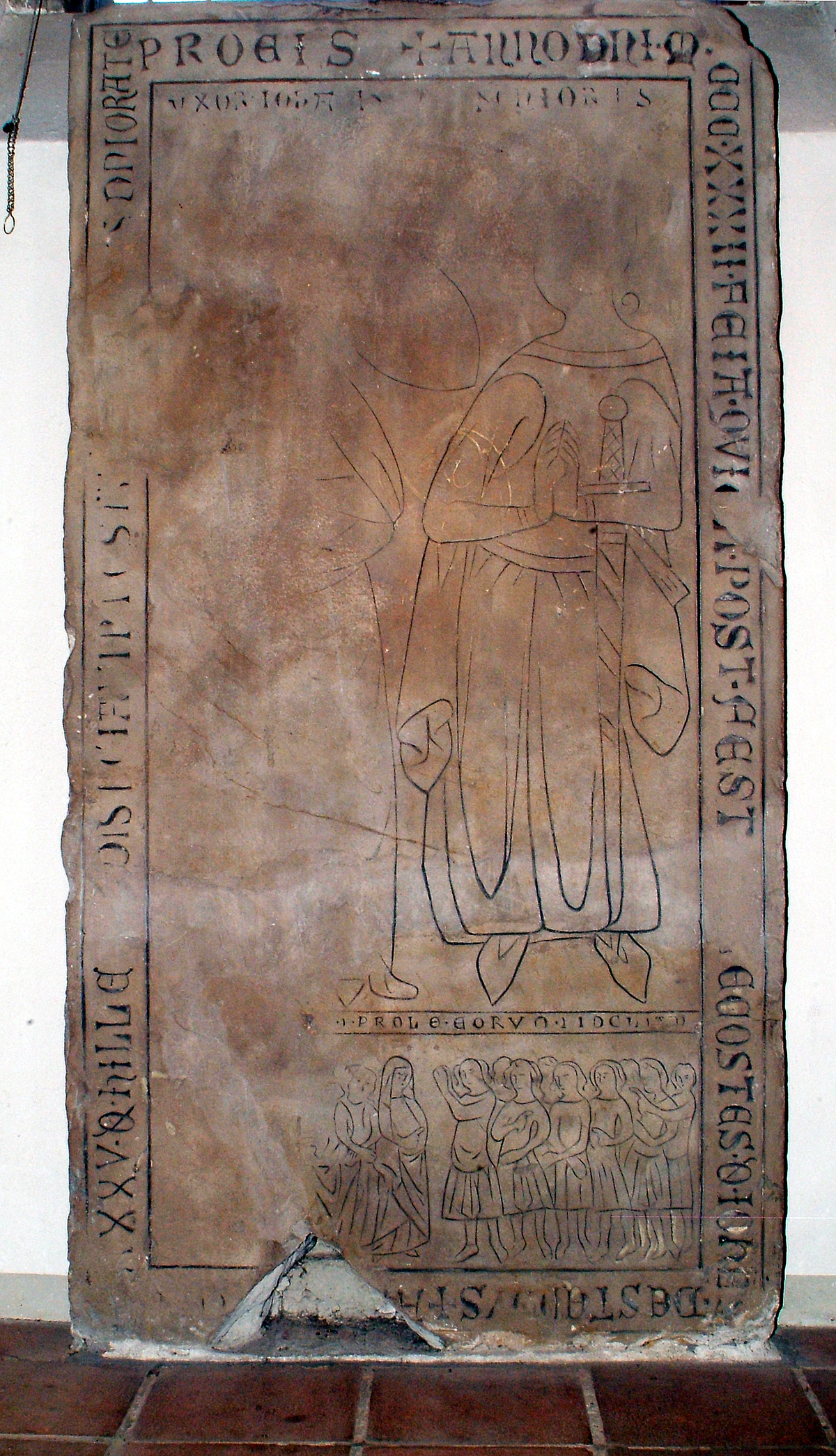 Grabplatte von Johannes de Lapideo Domo senior (Johannes vom Steinhaus der Ältere), gestorben 1332-06-11, und seiner Witwe Hildegardis gestorben 1335-12-30; Unterhalb von Johannes sind seine acht Söhne zu sehen, unterhalb von Hildegard die nicht mehr vollständig erhaltene Reihe der Töchter. Die Grabplatte war "wahrscheinlich" anfangs in oder an der Nikolaikapelle angebracht, wo Johannes, der am 6. März 1323 das Patronatsrecht über einen vom ihm dotierten Hochalter in der Nikolaikapelle vom Rat der Stadt übertragen bekam. Von dort gelangte die Platte in das Minoritenkloster, das später zur Schlosskirche am Leineschloss umgebaut wurde. Dort wurde sie erst wieder nach dem Zweiten Weltkrieg entdeckt und in der Kreuzkirche aufgestellt. Die Grabplatte ist das älteste erhaltene Gruppenbild einer hannoverschen Familie. Anders als seinerzeit auf Ritzzeichnungen üblich sind die einzelnen Familienmitglieder nicht schematisiert dargestellt, sondern - trotz sparsamster Zeichnung - unterschiedlich: Die Altersunterschiede und die einzelnen Charaktere der dargestellten Personen sind durchaus ablesbar ...